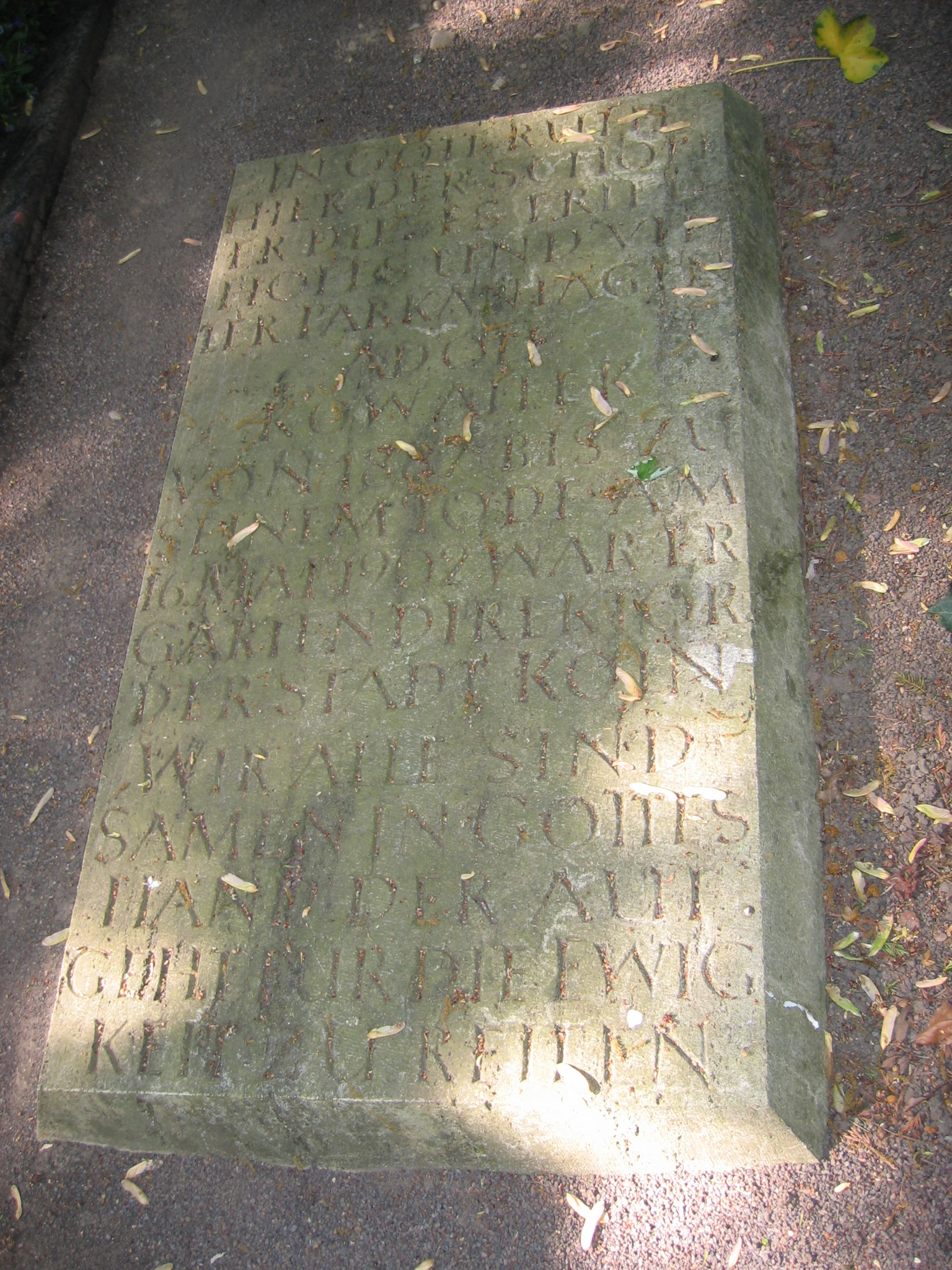 Südfriedhof (Köln), Grab von Adolf Kowallek